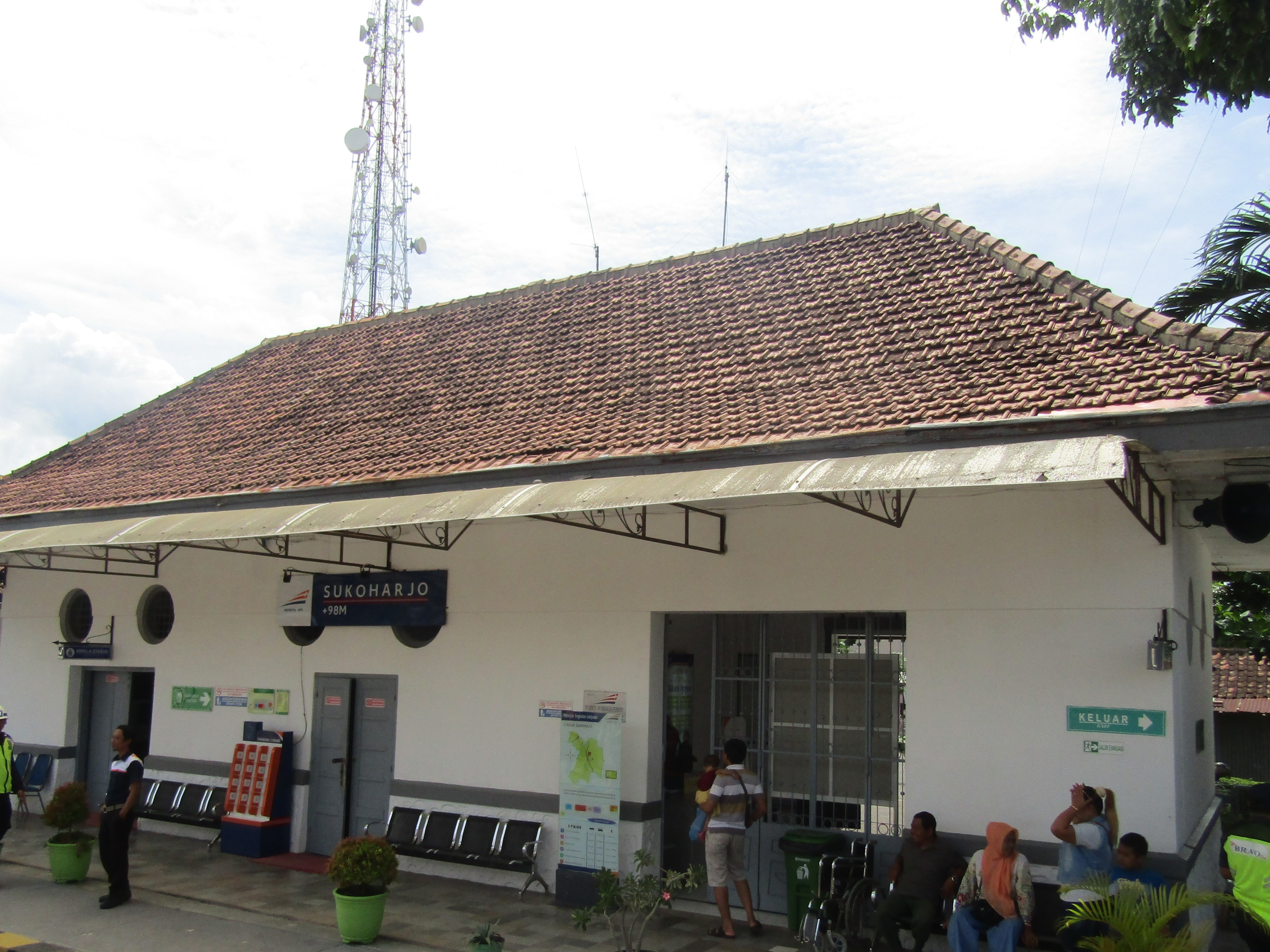 Stasiun Sukoharjo, 2020